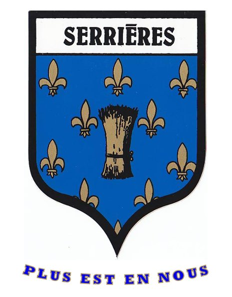 Blason de la ville de Serrières (Ardèche), accompagné de la devise de la ville. "Plus est en nous"